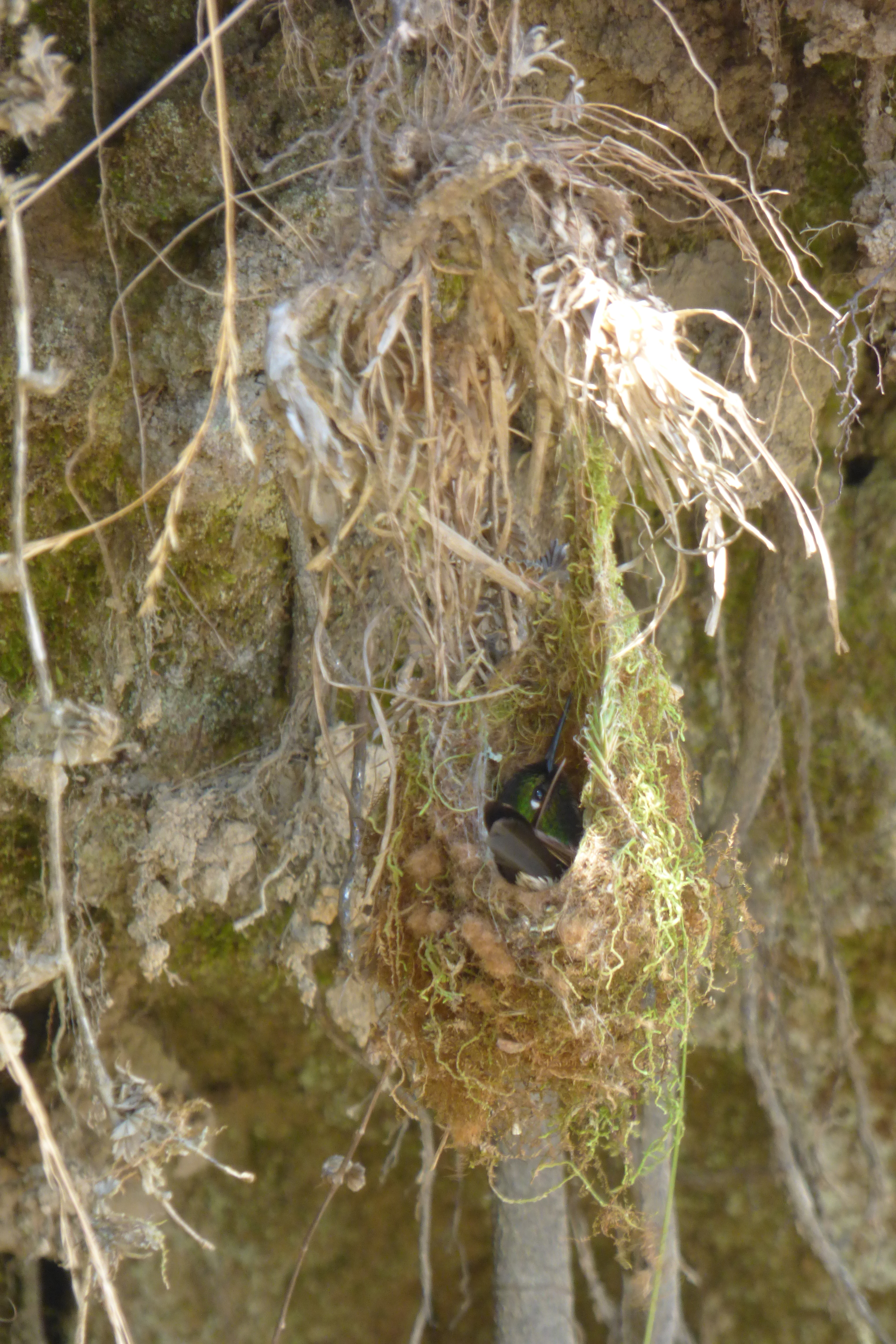 Eriocnemis mosquera (Paramero áureo)